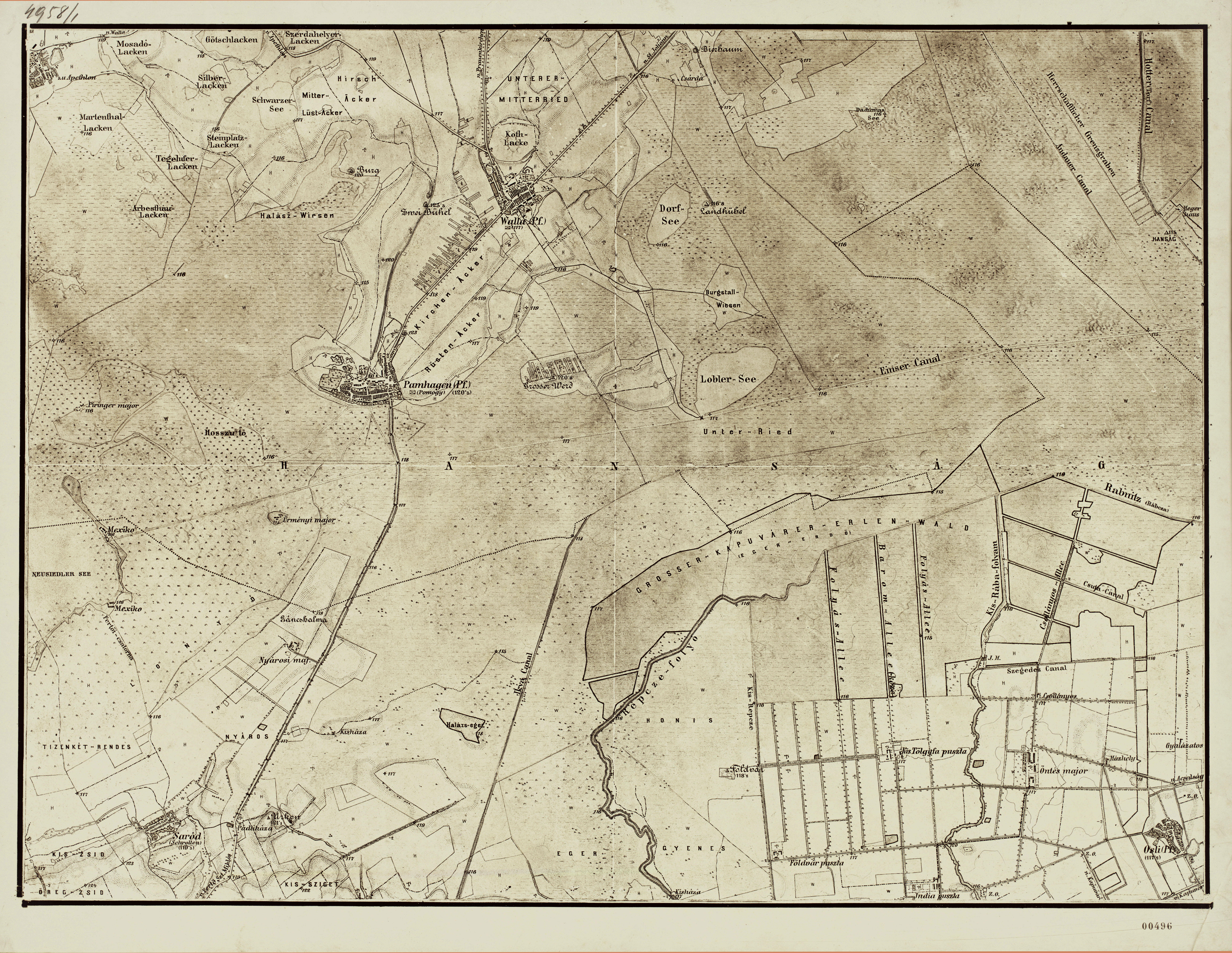 historische Landkarte: Arbeitsfassung von: Gradkartenblatt Zone 15 Colonne XVI Section NW (Nordwest) (später 4958/1). Saród/Schrollen, Pamhagen, Walla und Einserkanal in Westungarn (später teilweise Seewinkel, Burgenland). Franzisco-josephinische (3.) Landesaufnahme der österreichisch-ungarischen Monarchie. Maßstab 1:25.000.